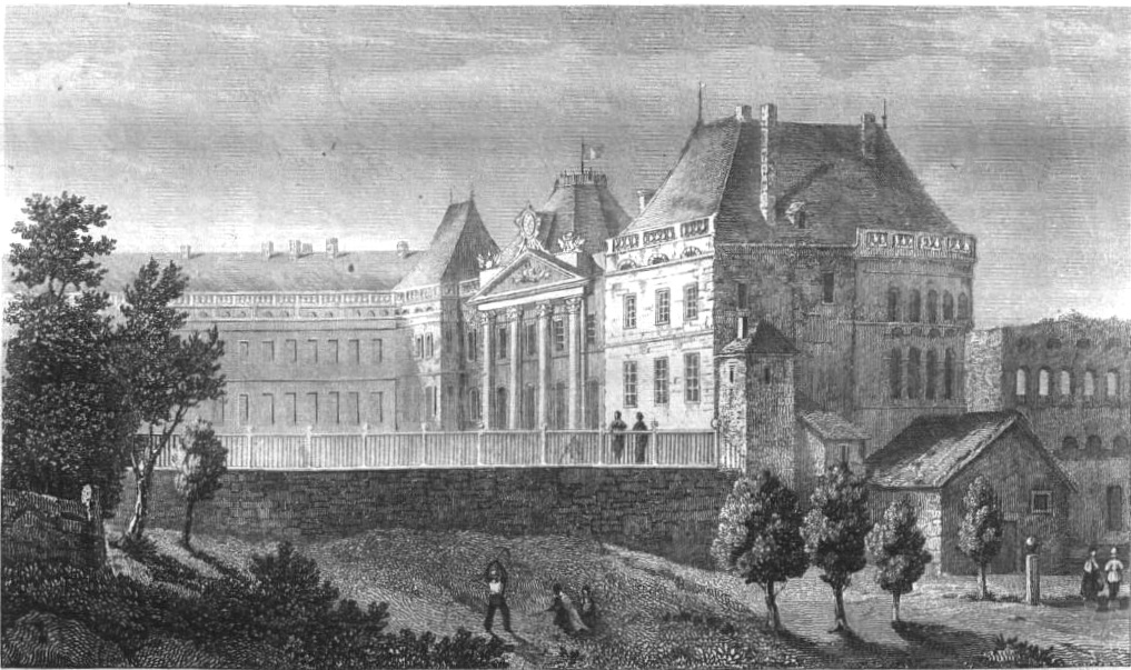 Image en provenance du livre : Eusèbe Girault de Saint-Fargeau, Guide pittoresque du voyageur en France, contenant la statistique et la description complète des quatre-vingt-six départements, orné de 740 vignettes et portraits gravés sur acier, de quatre-vingt-six cartes de départements et d'une grande carte routière de la France, par une Société de gens de lettres, de géographes et d'artistes, Paris, F. Didot frères, 1838, 6 volumes in-8° (BNF : 8-L25- 46). Volume III Didot frères, 1838. Route de Paris à Nice traversant les départements de l'Isère, des Hautes-Alpes, des Basses-Alpes et du Var. auteurs dessins : Rauch (ou autre) auteurs gravures : Skelton fils, Schroeder, Bishop (ou autre)